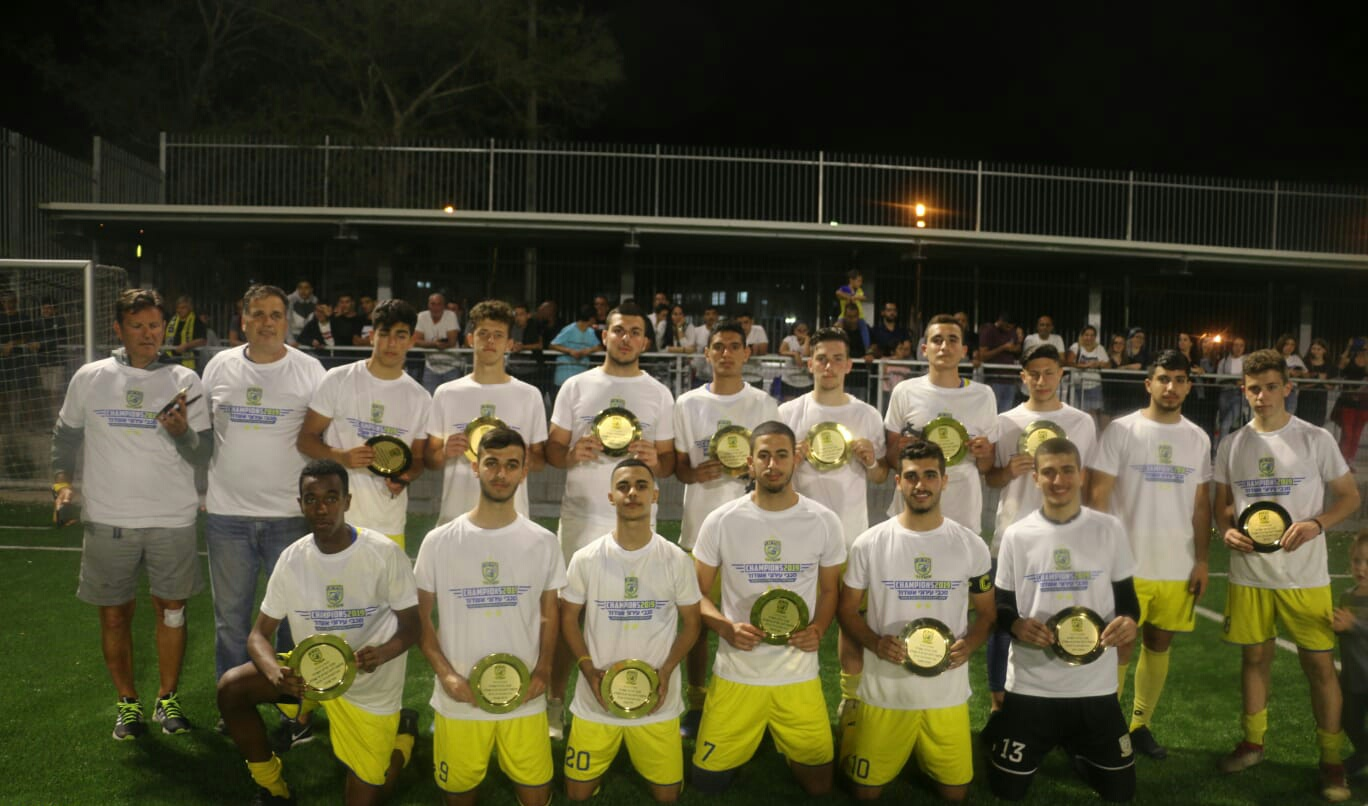 נערים א' מכבי עירוני אשדוד במשחק העלייה לליגה הארצית 2018/19